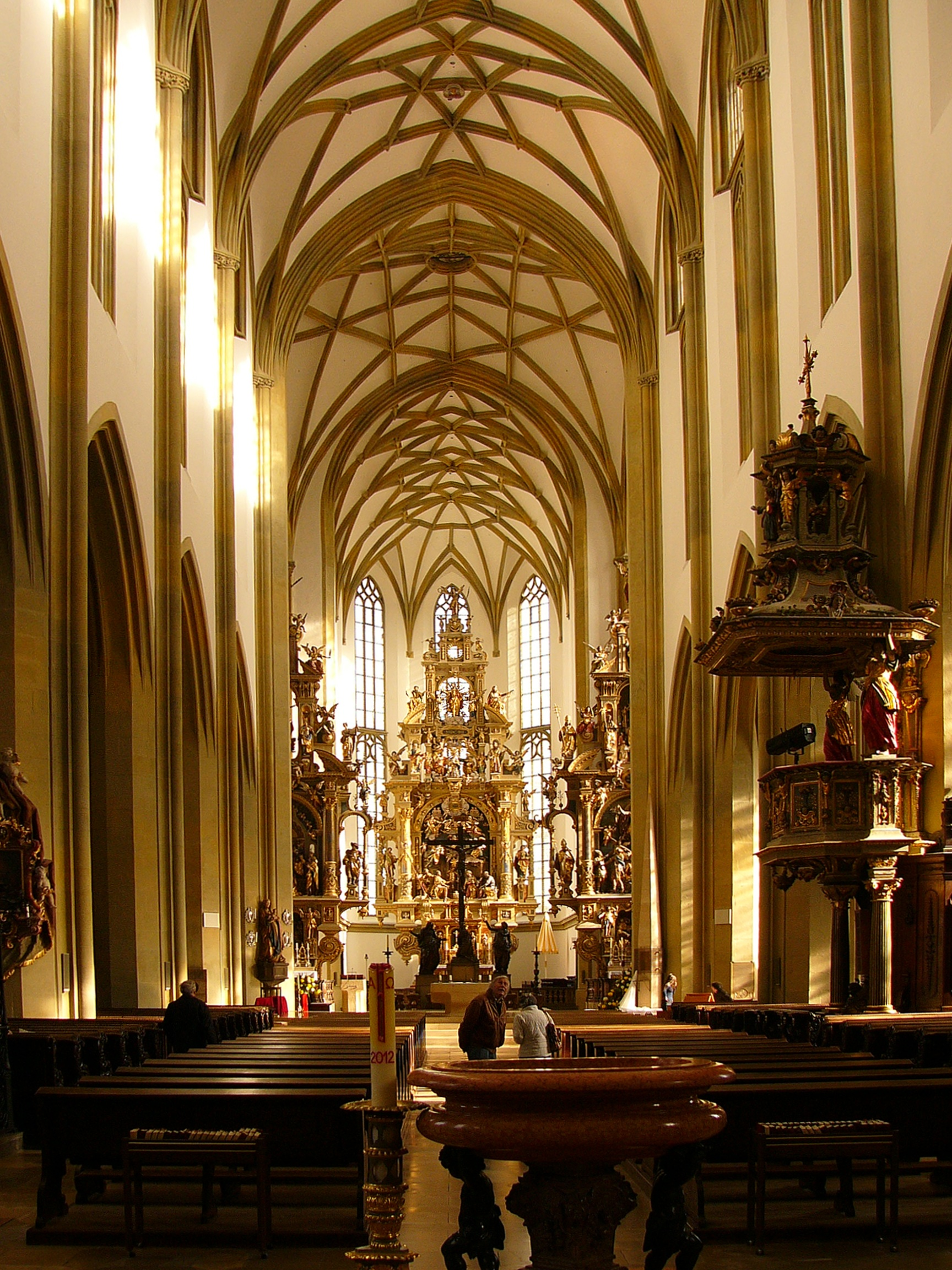 Ehem. Benediktiner-Stiftskirche, jetzt Katholische Stadtpfarrkirche St Ulrich und Afra, dreischiffige Basilika mit nördlichem Turm mit Zwiebelhaube, Stiftsgründung 969, Neubau der Kirche vermutlich nach Entwürfen von Hans von Hildesheim ab 1467, 1489 Wölbung des nördlichen Seitenschiffes, 1499 Wölbung des Langhauses, 1500 Grundsteinlegung zum Chor, Bauarbeiten mit Unterbrechung bis 1603; mit Ausstattung; ehem. Kapelle St Godehard, Grundmauern einer wohl merowingischen und einer vorromanischen Anlage, nach 1944 im ehem. Klosterbereich von St Ulrich, südlich des Chores, freigelegt.This is a photograph of an architectural monument.